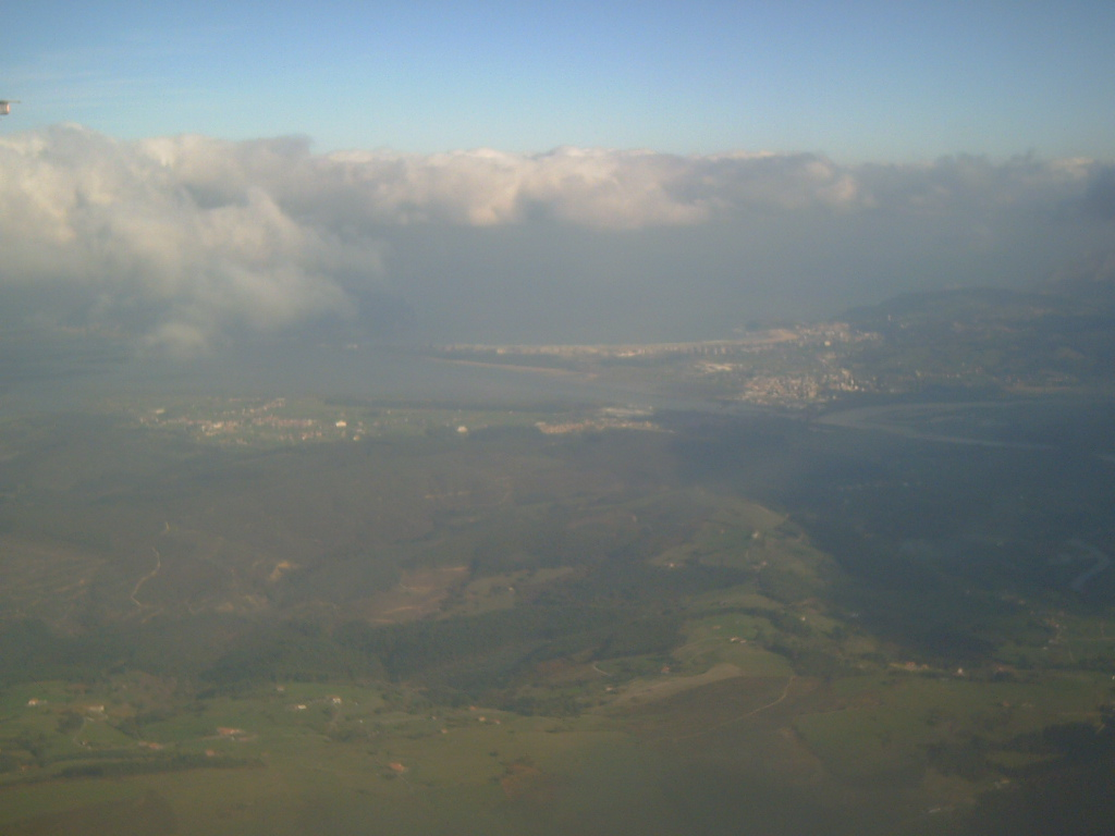 Santoña and Laredo, Cantabria (Spain) Santoña y Laredo, Cantabria (España)